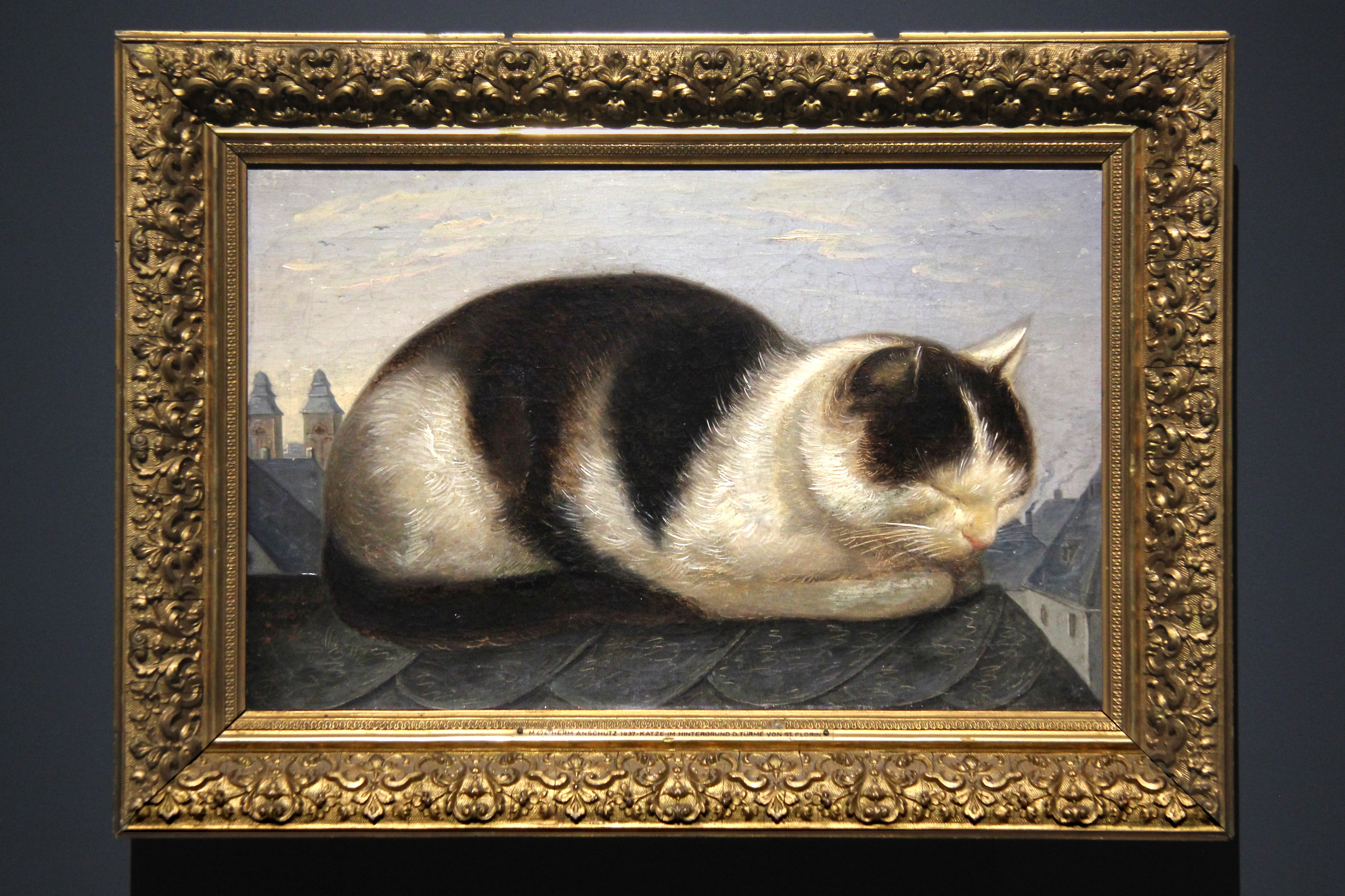 Hermann Anschütz 1837: Katze, links im Hintergrund die Türme von St. Florin, Koblenz; Mittelrhein-Museum, Koblenz